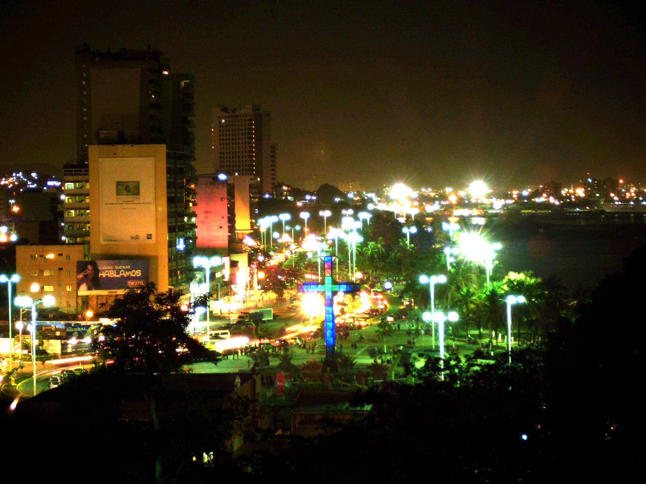 Vista del Paseo La Cruz desde Hotel Venetur Puerto La Cruz